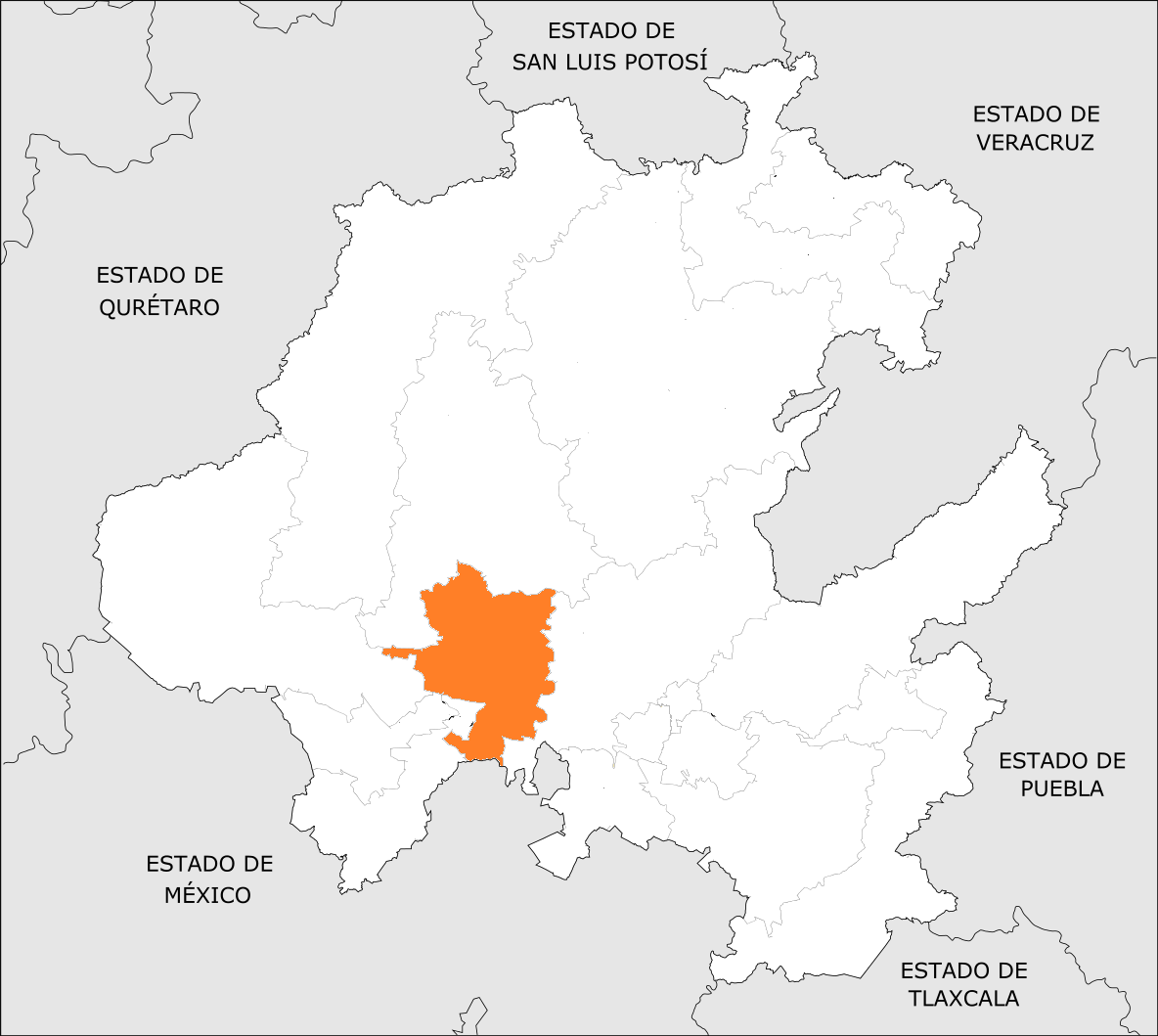 Distrito Electoral Local de Hidalgo 07